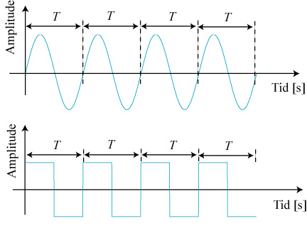 Sinus og firkantkurver